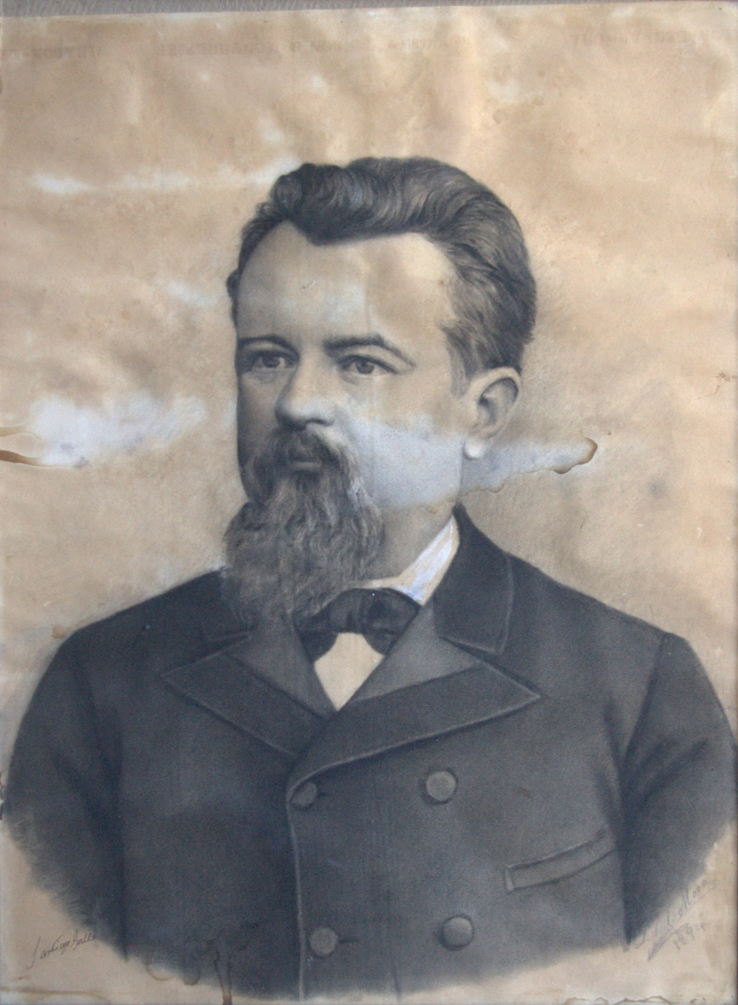 Dibujo hecho por Lola Mora en carbonilla